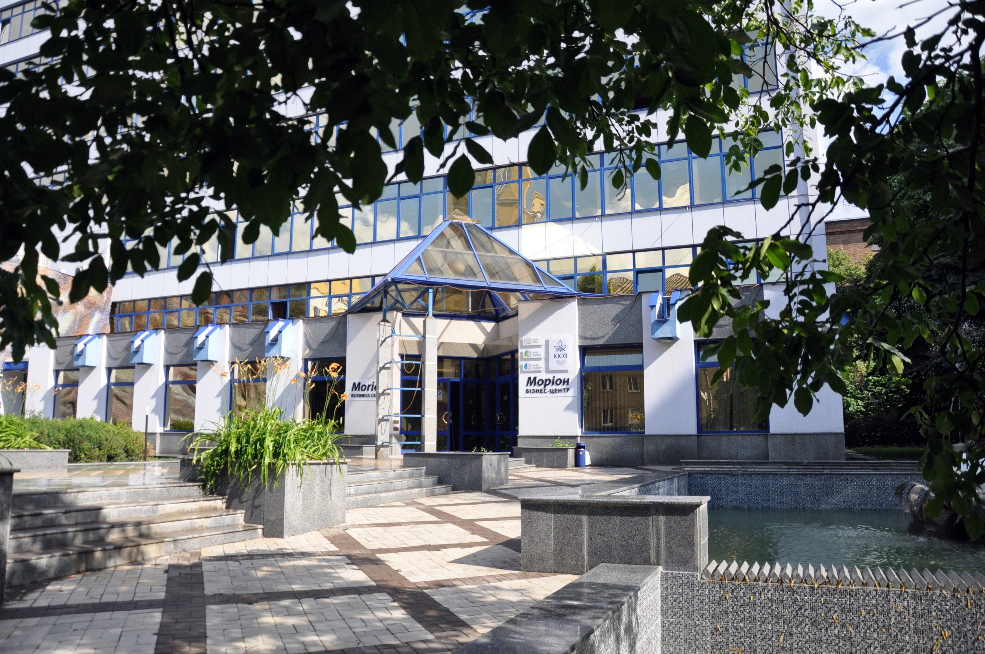 Здание, в котором расположена Main Academy в Киеве